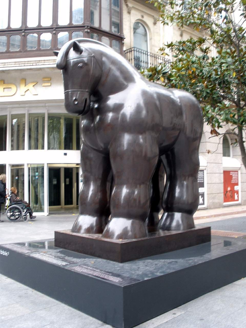 Bilbao - Fernando Botero, 'Caballo con bridas' (2009)